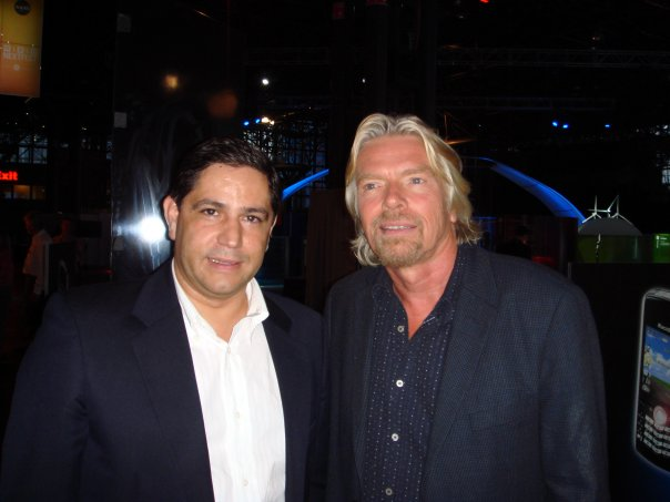 Homme d' affaires